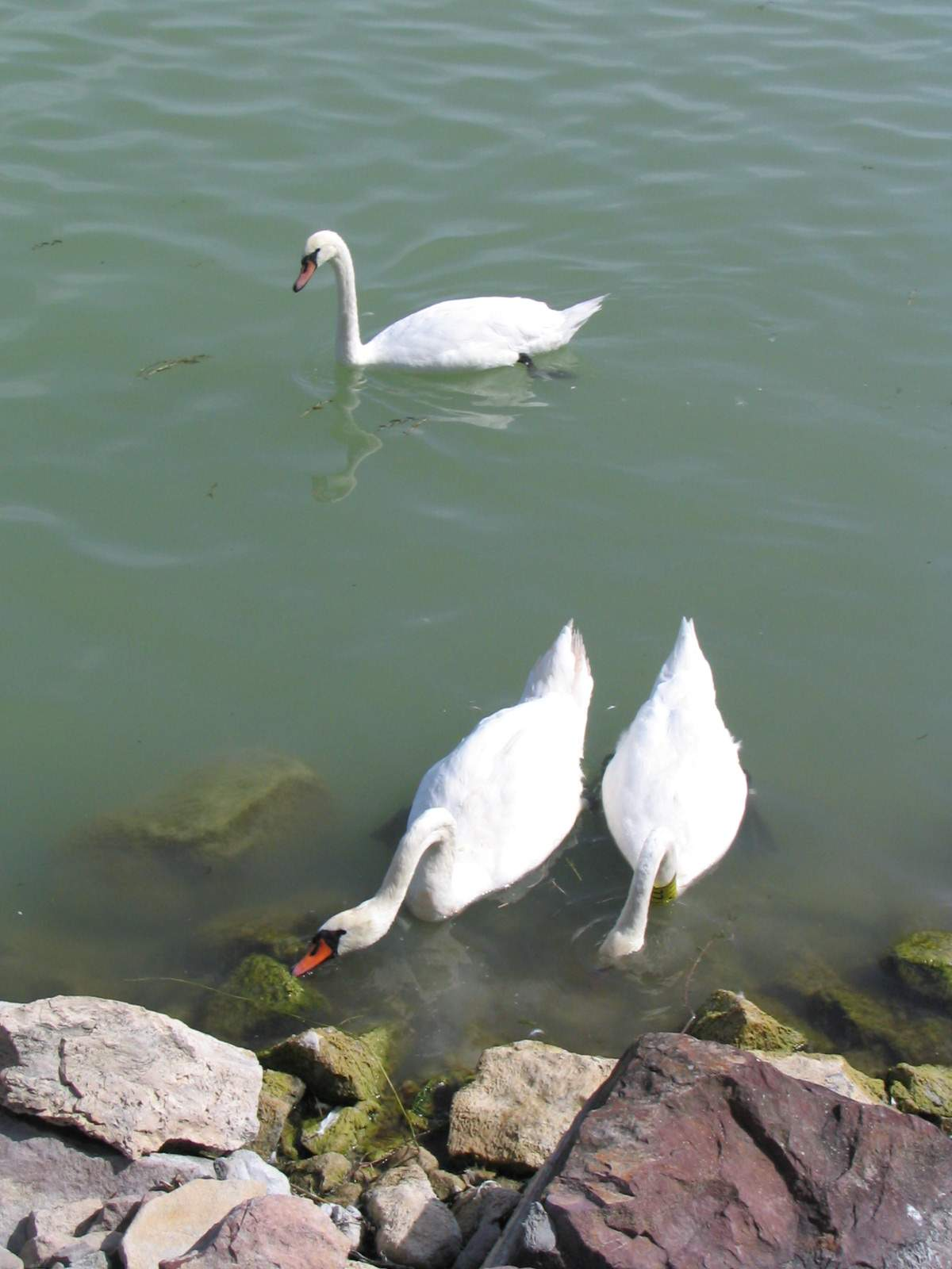 Swans on Balaton